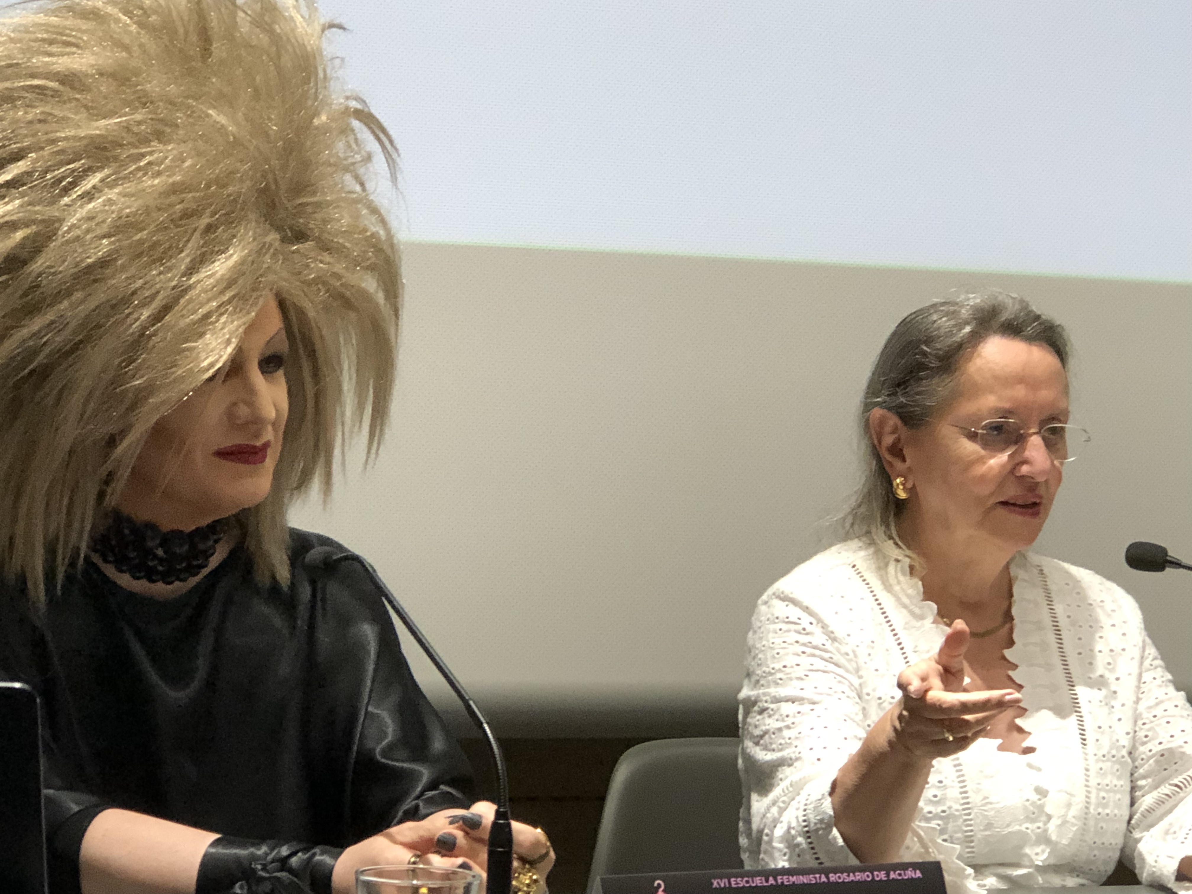 Escuela Feminista Rosario Acuña de Gijón 2019